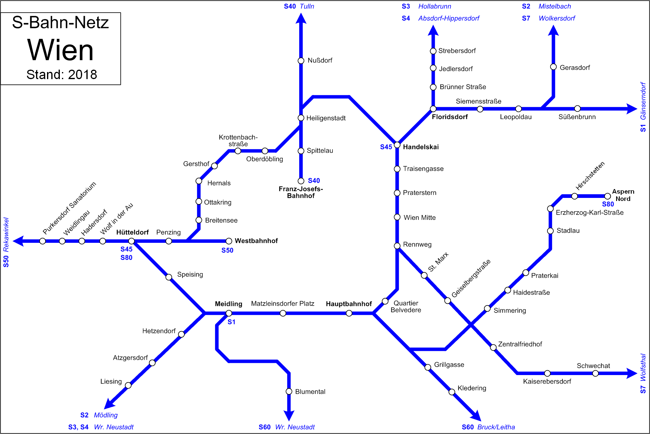 S-Bahn Netz-Wien